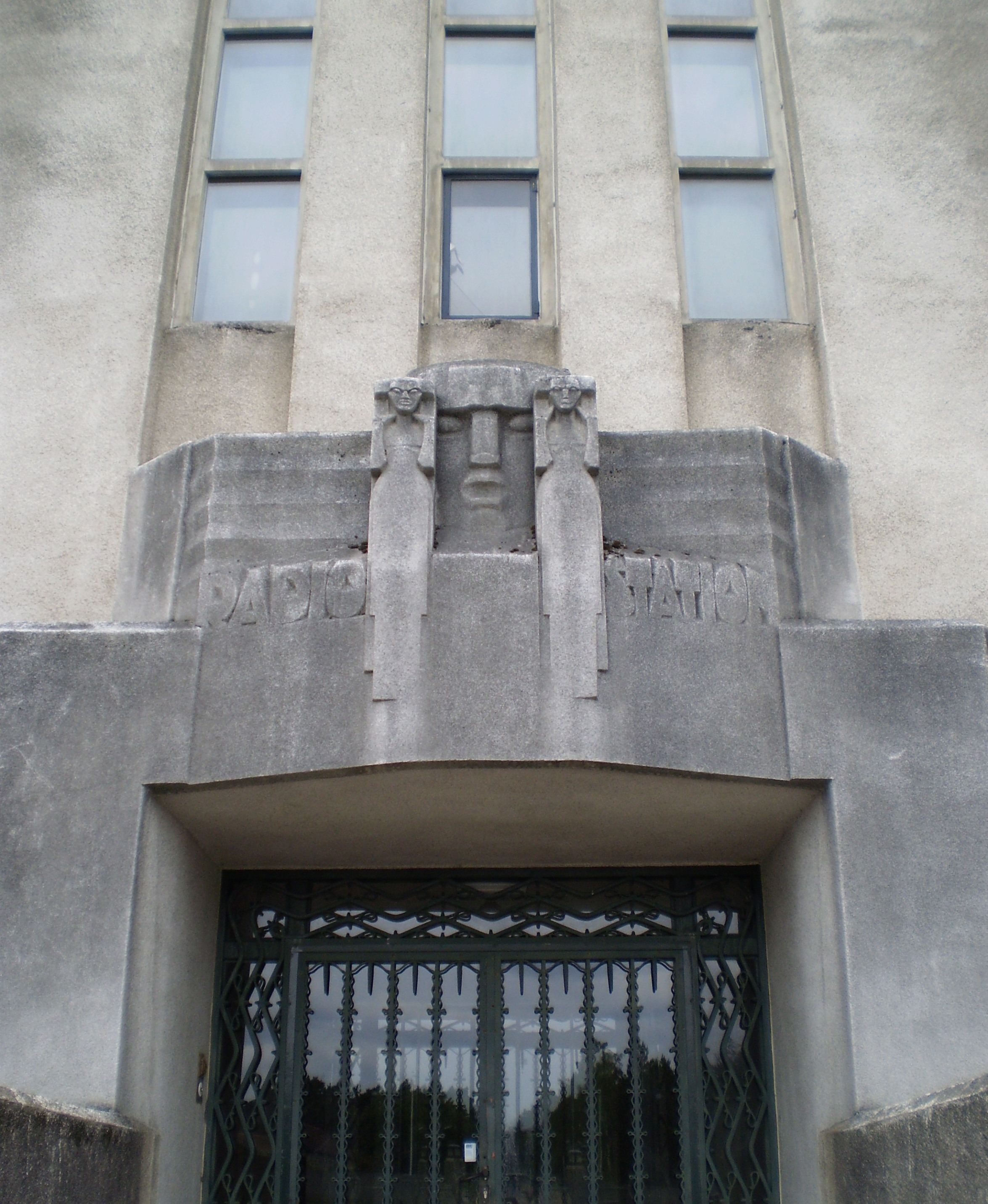 Reliëf boven de hoofdingang van gebouw A van Radio Kootwijk, ontworpen door Hendrik van den Eijnde